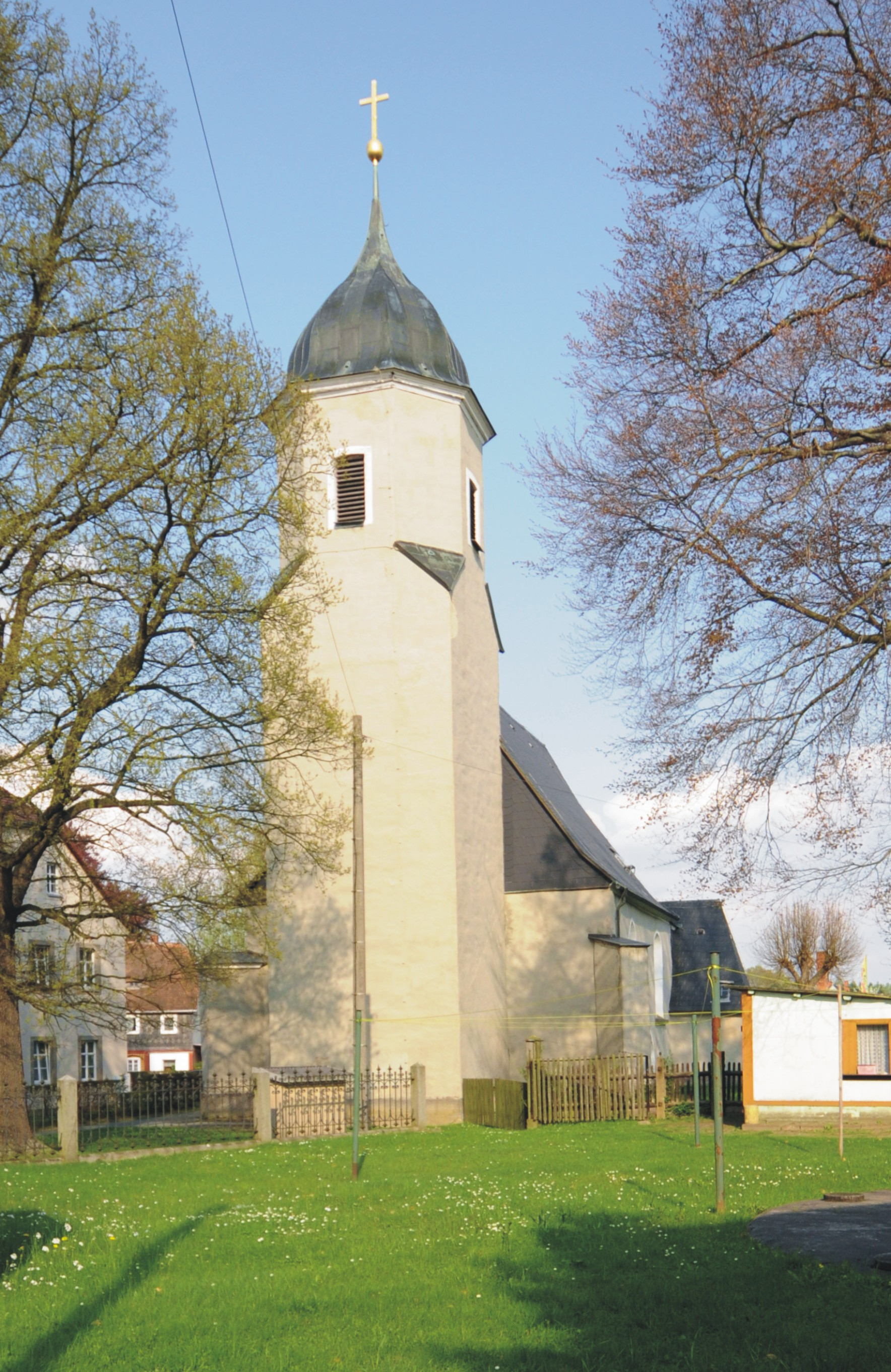 Evangelische Pfarrkirche in Neusalza (Neusalza-Spremberg, Sachsen, Deutschland)